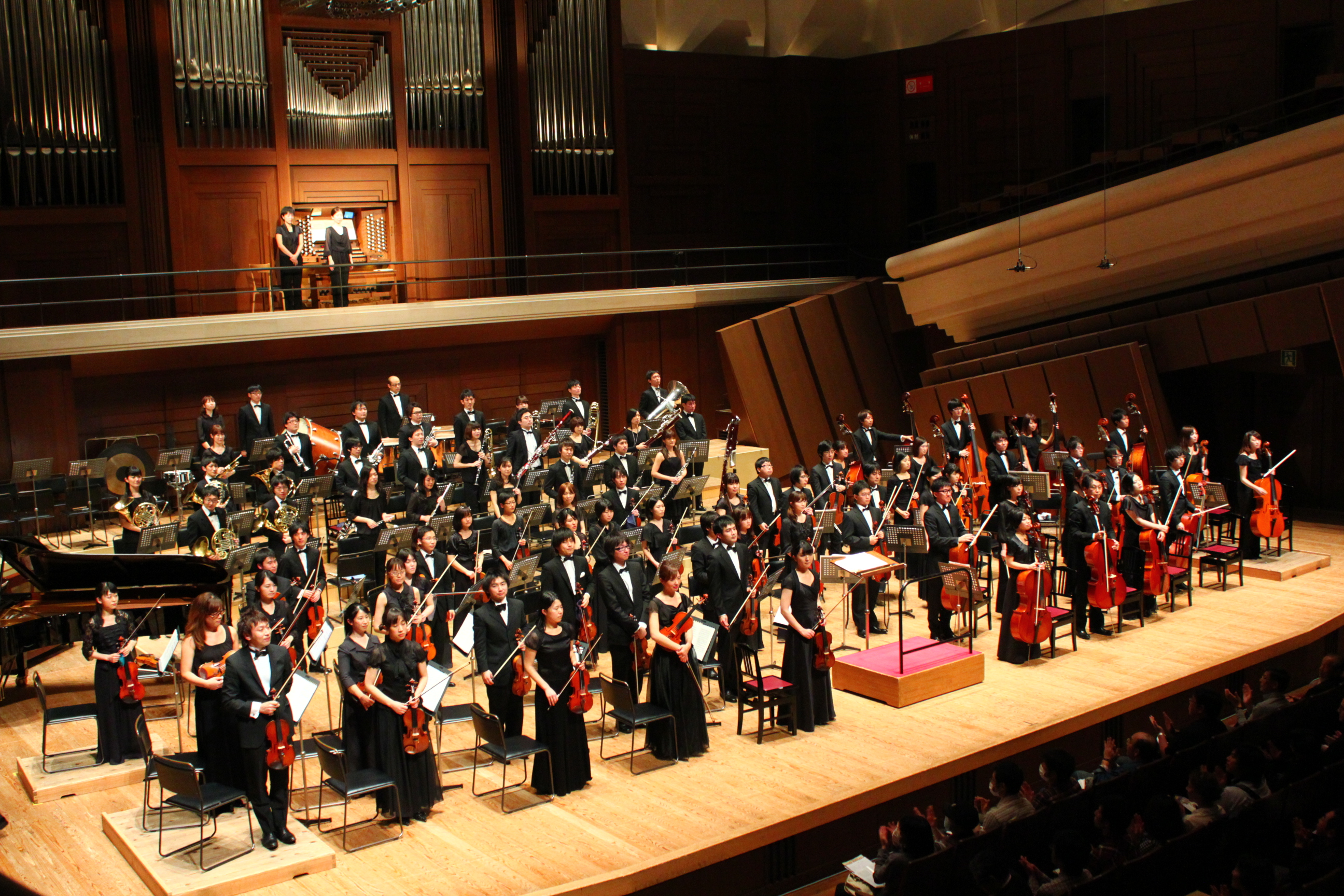 ユーゲント・フィルハーモニカー